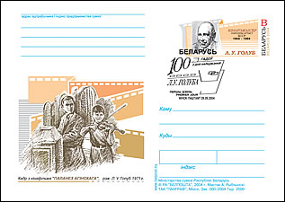 Почтовая карточка Беларуси с оригинальной маркой, посвященная 100-летию со дня рождения Л. В. Голубя.